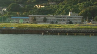 国立唐津海上技術学校